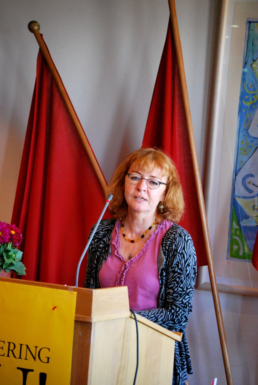 Pernille Frahm taler til SF Glostrups 1. maj-arrangement 2011.